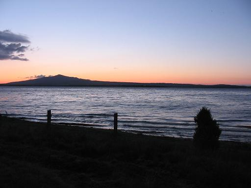 Vista del Embalse de Santillana al amanecer